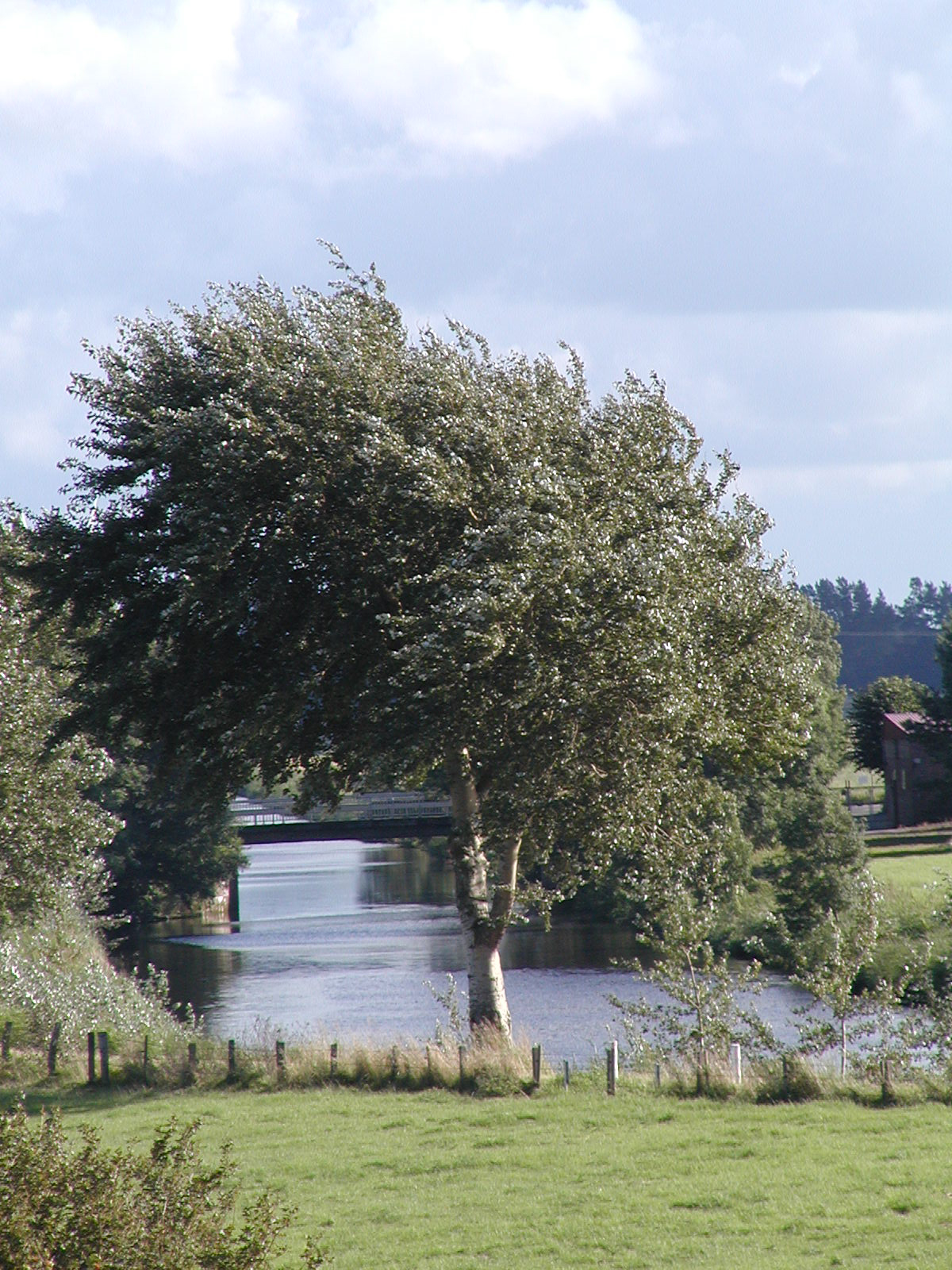 Der Hadeler Kanal